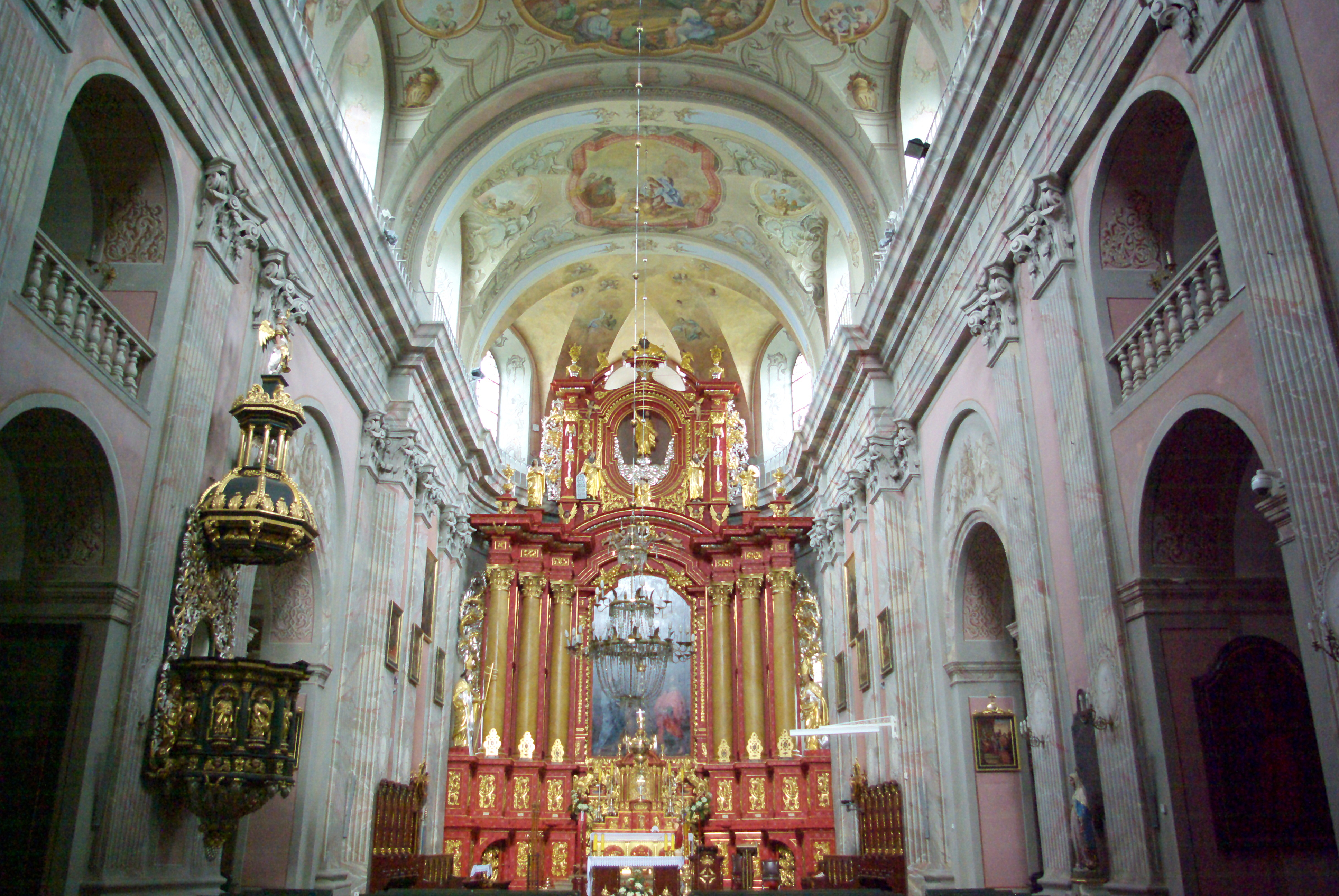 Wnętrze Kościoła Przemienienia Pańskiego w Brzozowie